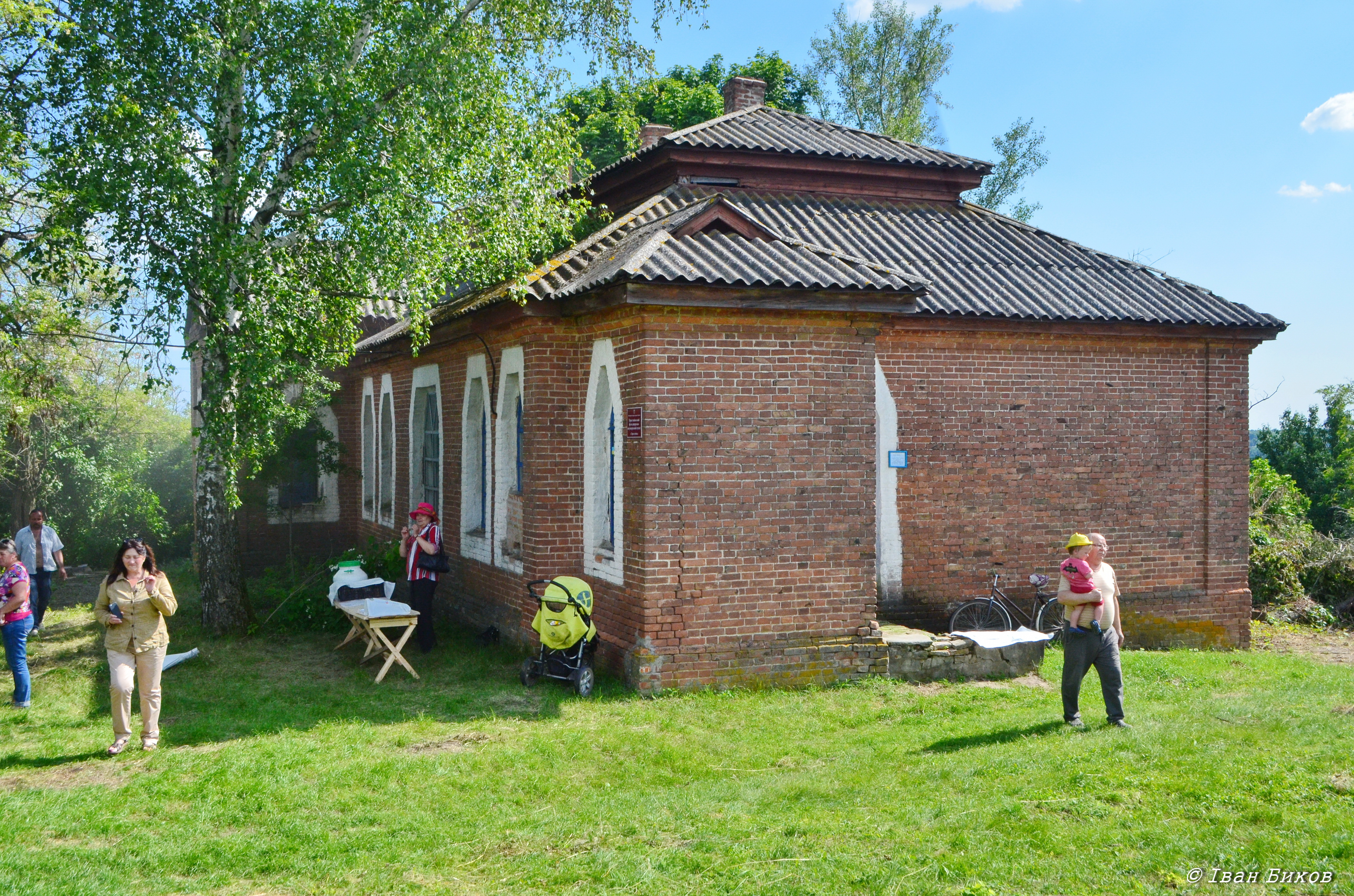 Збудована Лохвицьким повітовим земством за проектом видатного митця Опанаса Сластіона. Репрезентує стиль український архітектурний модерн. Нещодавно Ольга Герасим'юк та Оксана Олійник провели у Христанівці толоку з благоустрою території та відновлення приміщення школи.